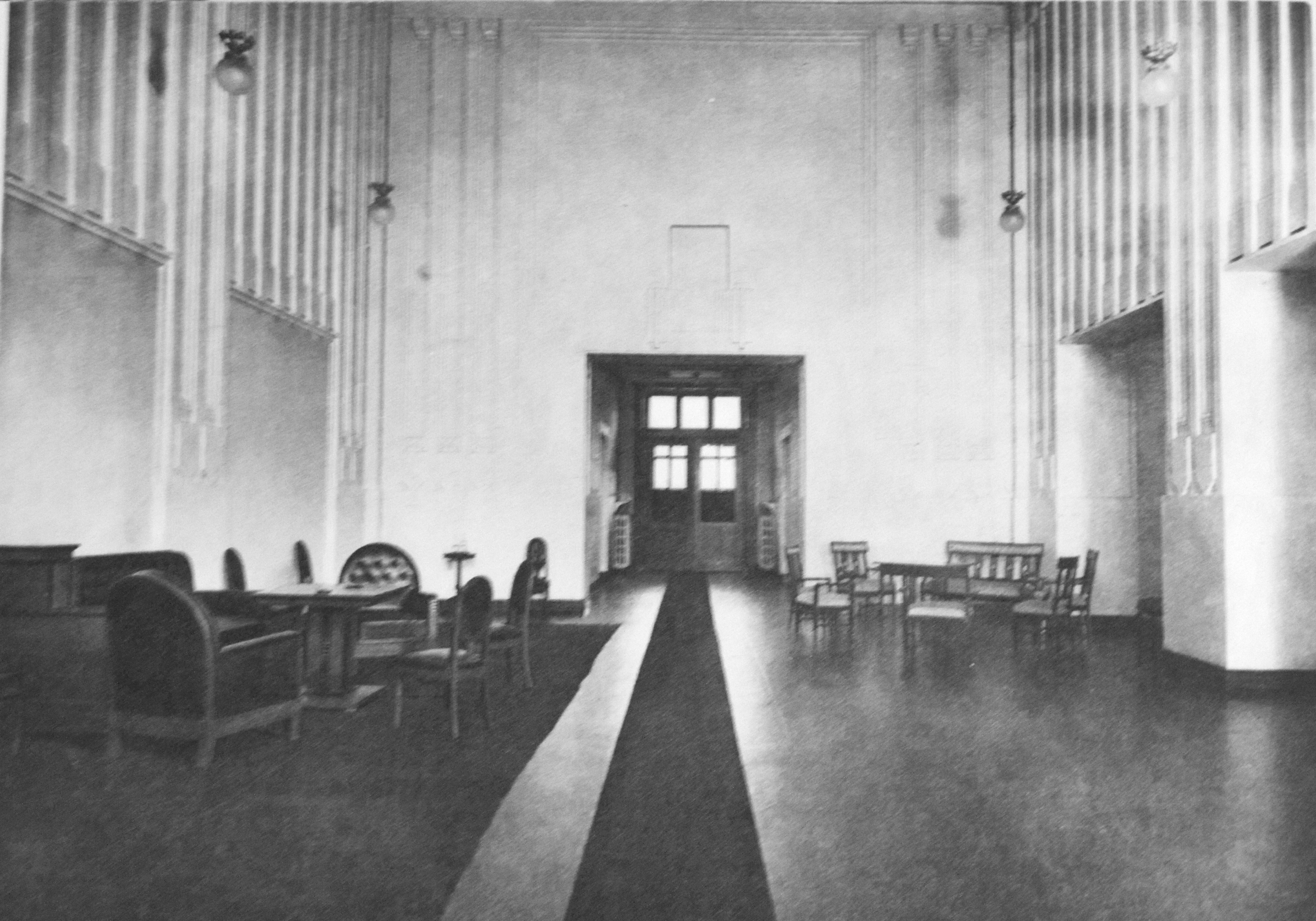 Helsingin odotussali Helsingin päärautatieasemalla.